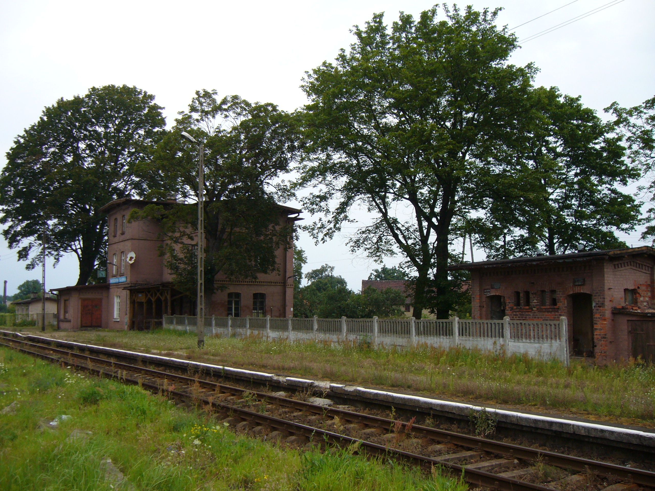 Przystanek kolejowy Wierzbowa Śląska w miescowości Wierzbowa, powiat bolesławiecki, peron i budynek dworca.